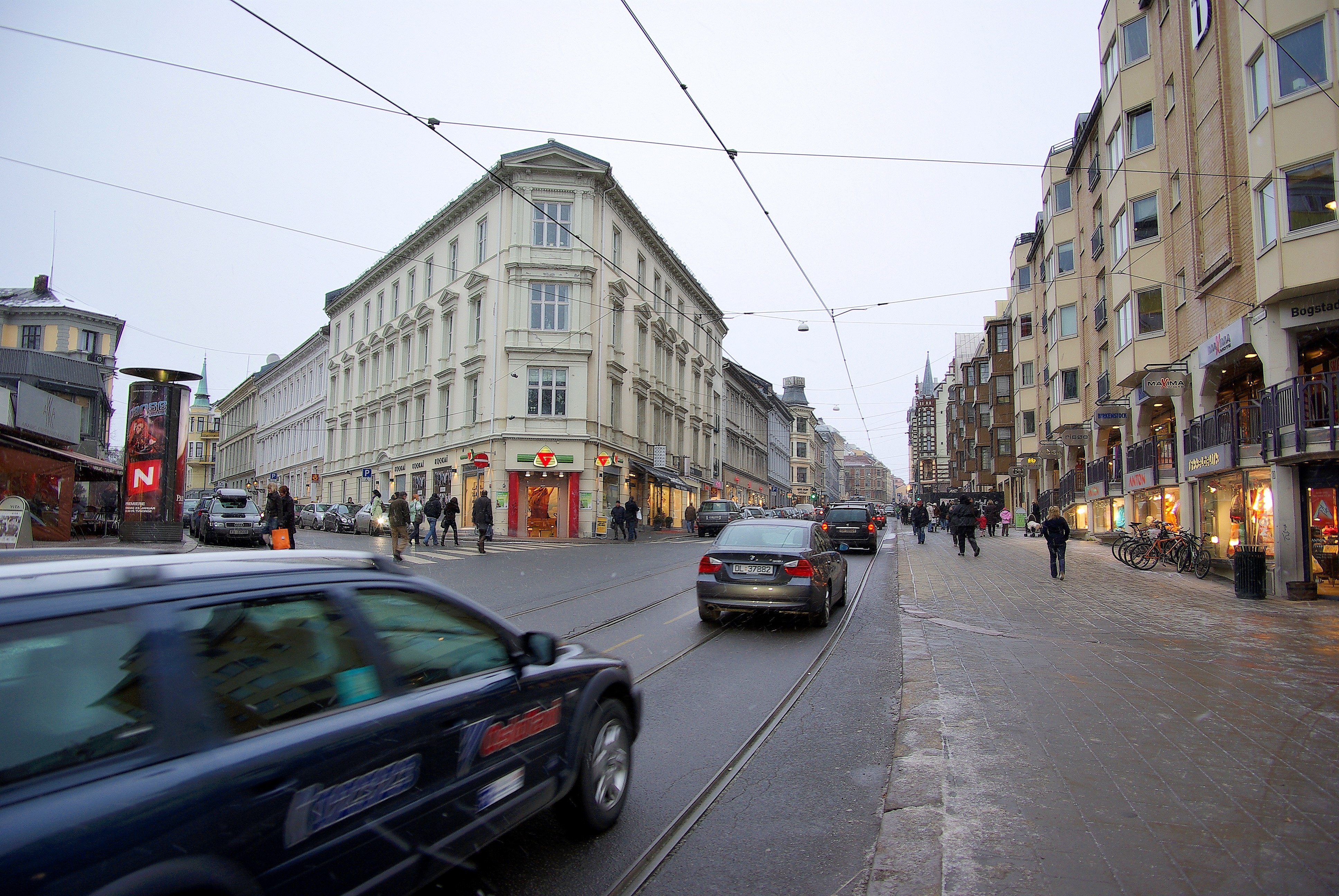 Bogstadveien, a central shopping street in Oslo, Norway.